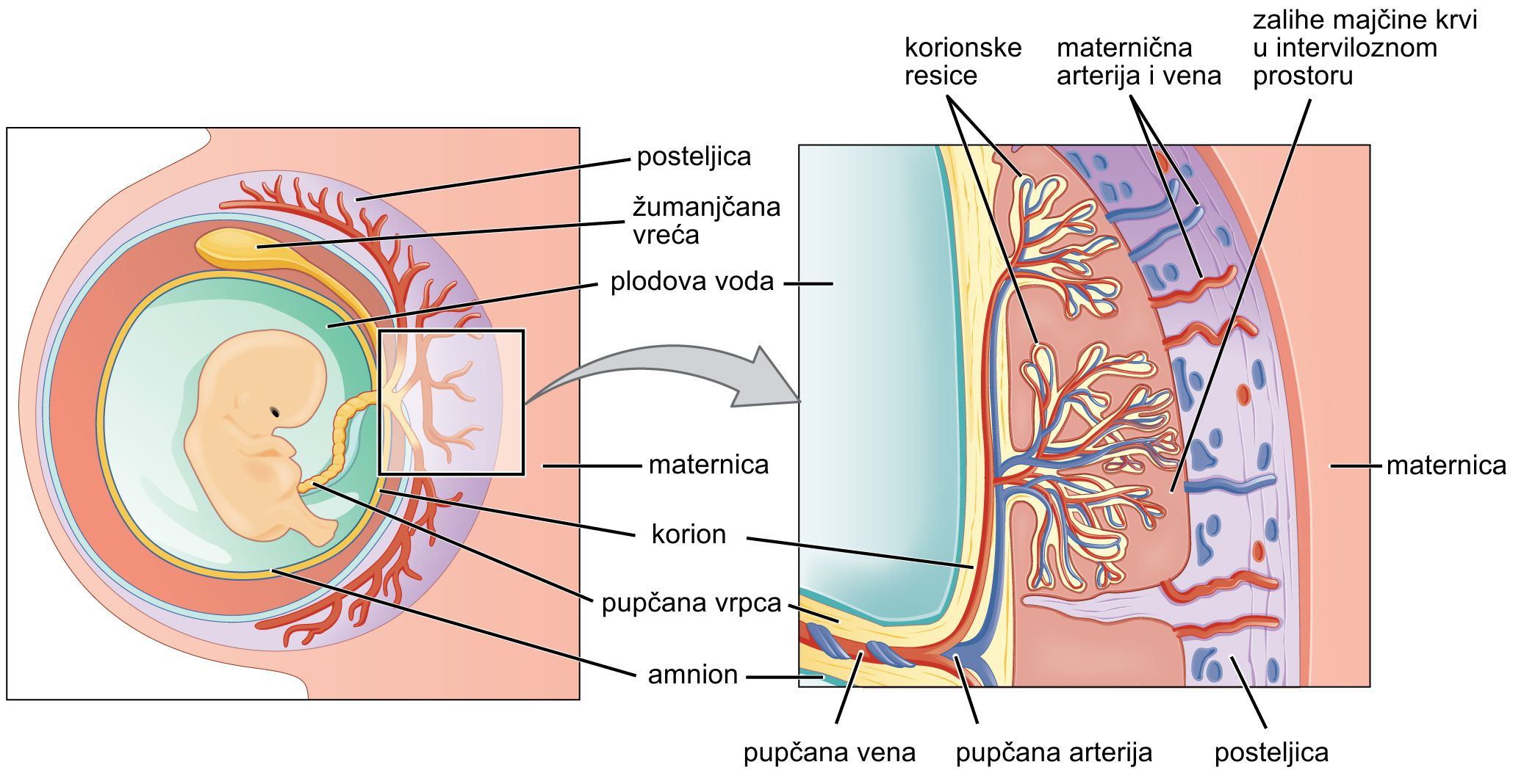 Prikaz posteljice